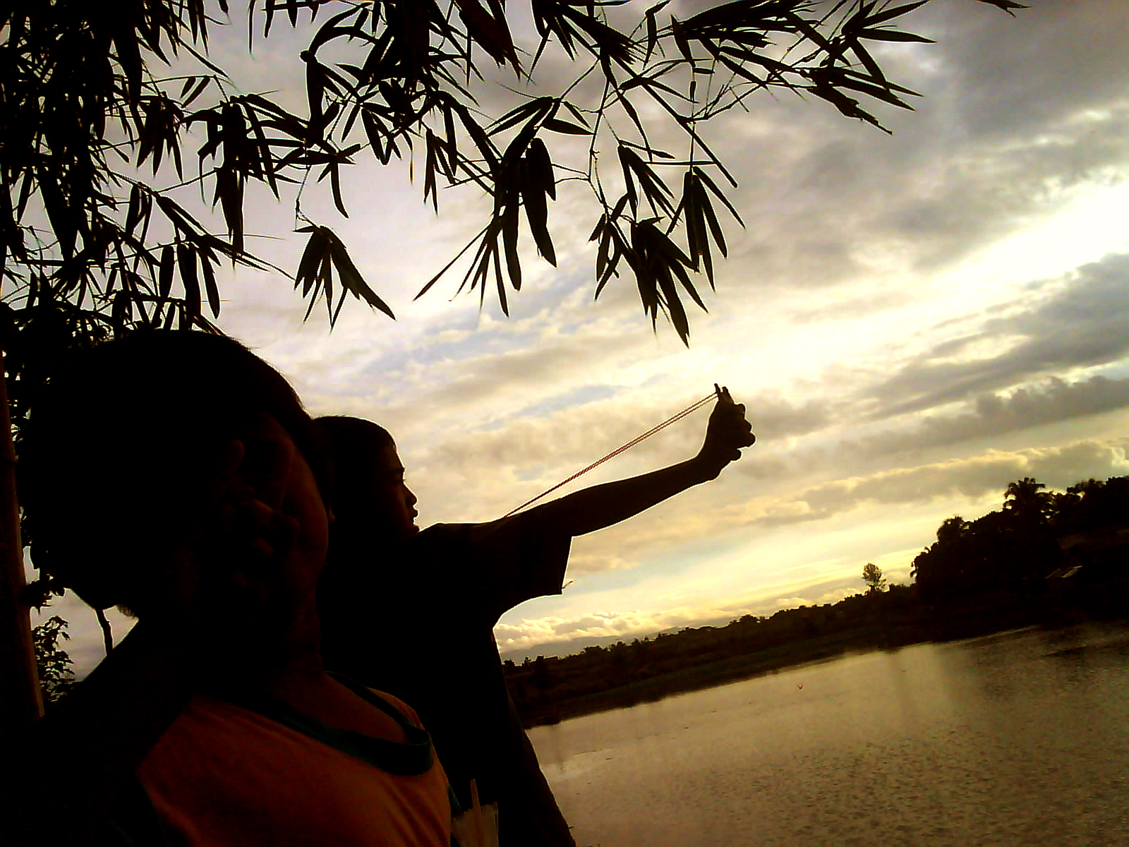 setu kemuning saat sore